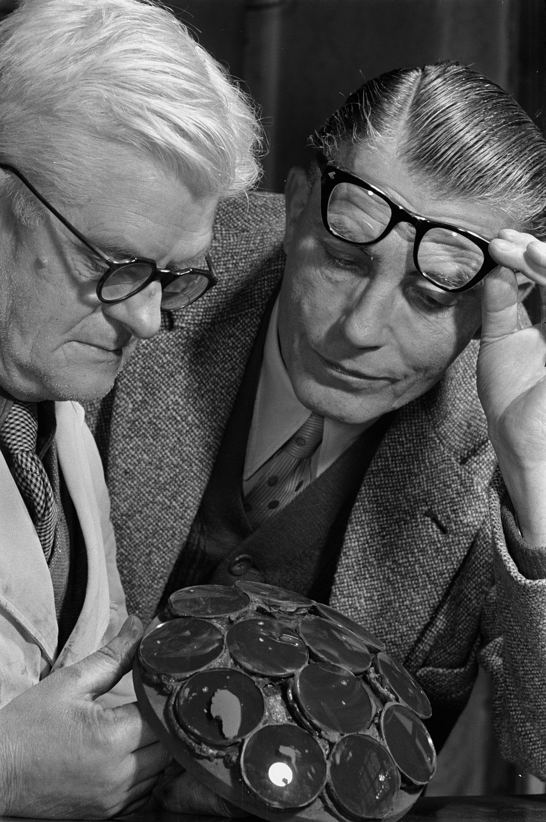 Karl Pouva (rechts) begutachtet mit einem Mitarbeiter auf einen Tragkörper gekittete Linsen. Anders als in der originalen Bildbeschreibung der Deutschen Fotothek angegeben handelt es sich nicht um Linsen für die Pouva Start, sondern um Kondensorlinsen für den Kleinbildprojektor Pouva Magica. Dieses Bild beweist auch, daß Pouva seine optischen Bauteile selbst herstellte.